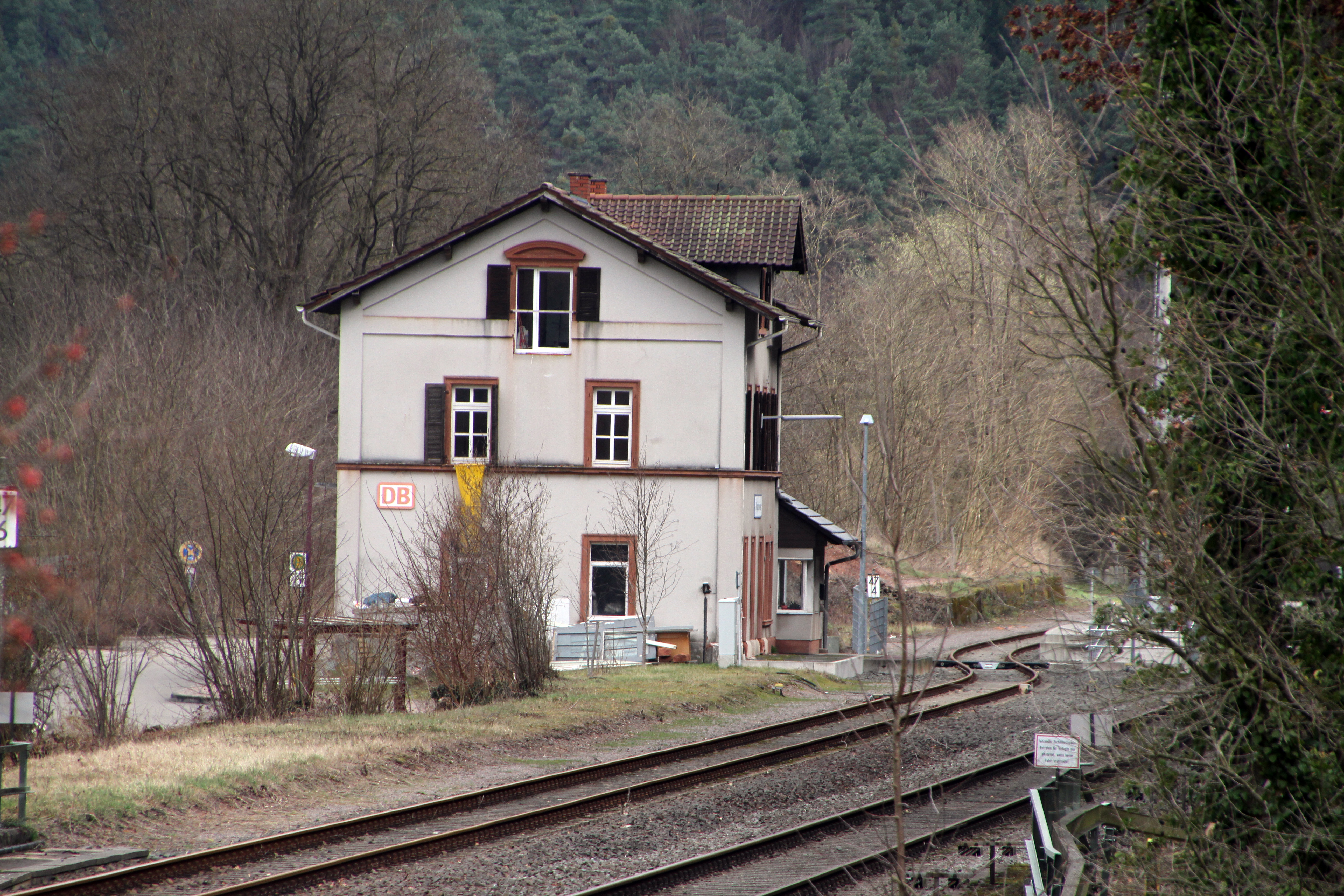 Wilgartswiesen